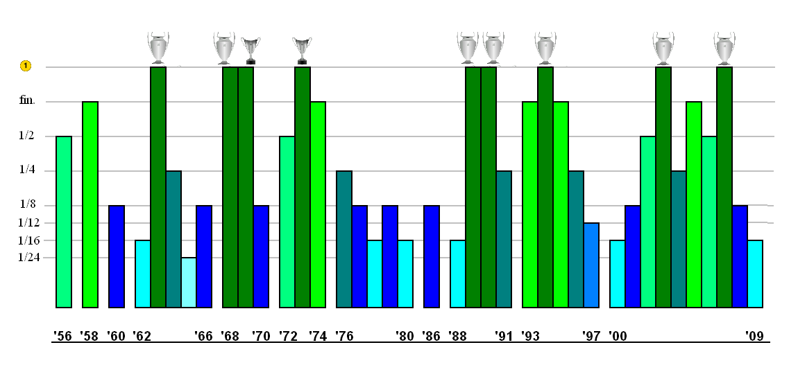 AC Milan in european cupsAC Milan w poszczególnych sezonach europejskich pucharów